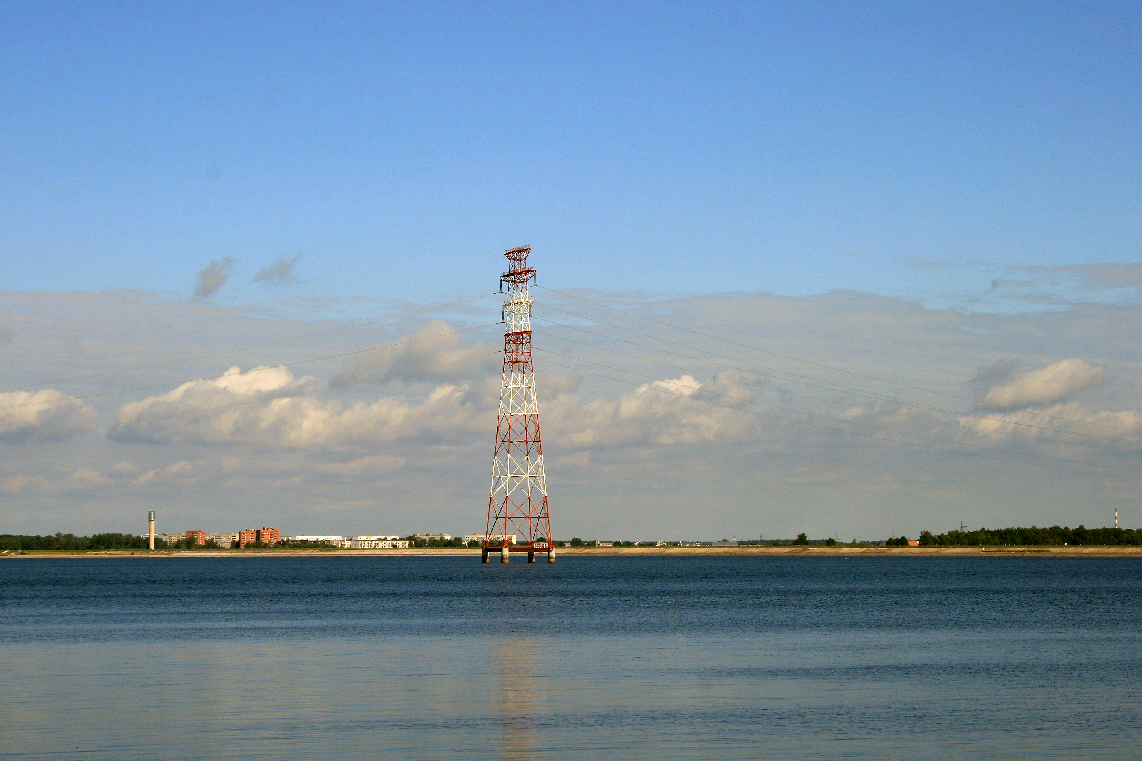 Daugava